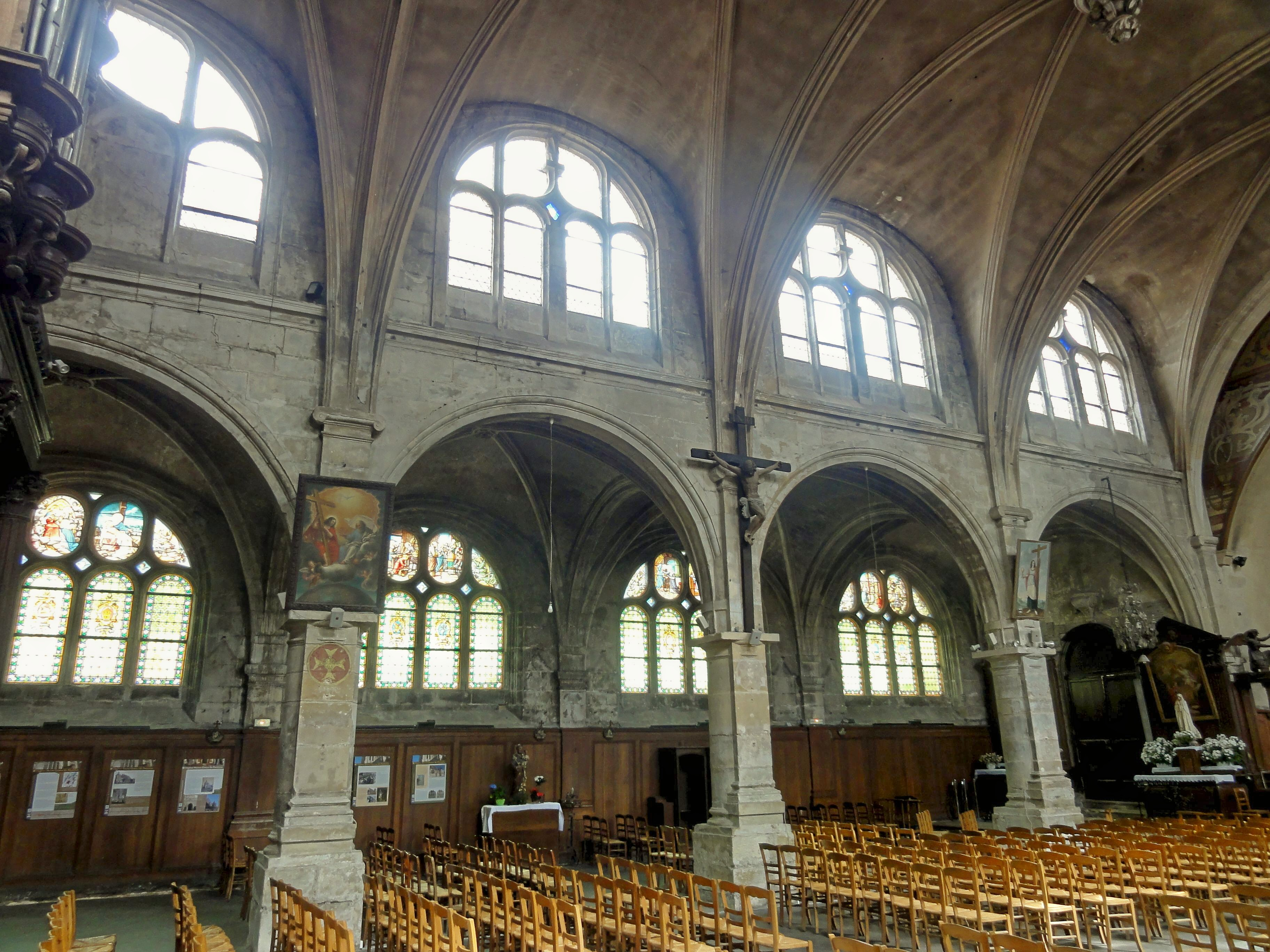 Grandes arcades au nord de la nef et vue sur le bas-côté nord.